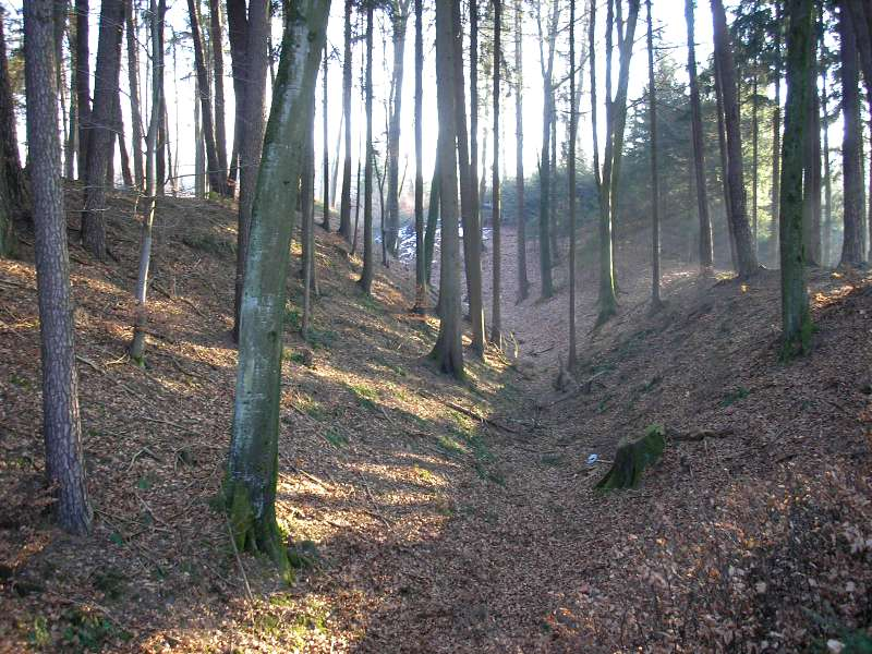 Burgstall Burgadelzhausen.